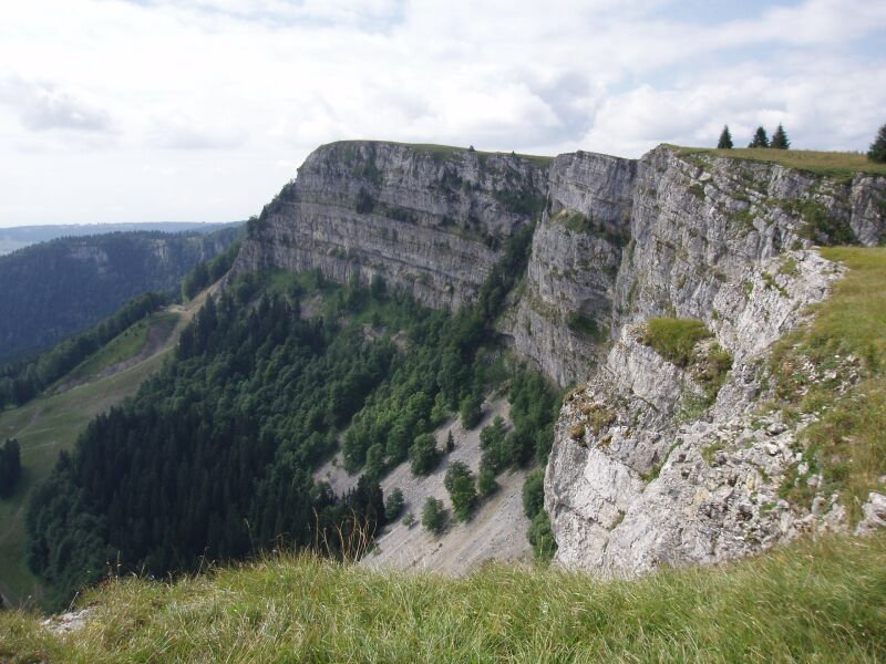 Felsabstürze am Mont-d'Or (französischer Jura), Département Doubs, Frankreich